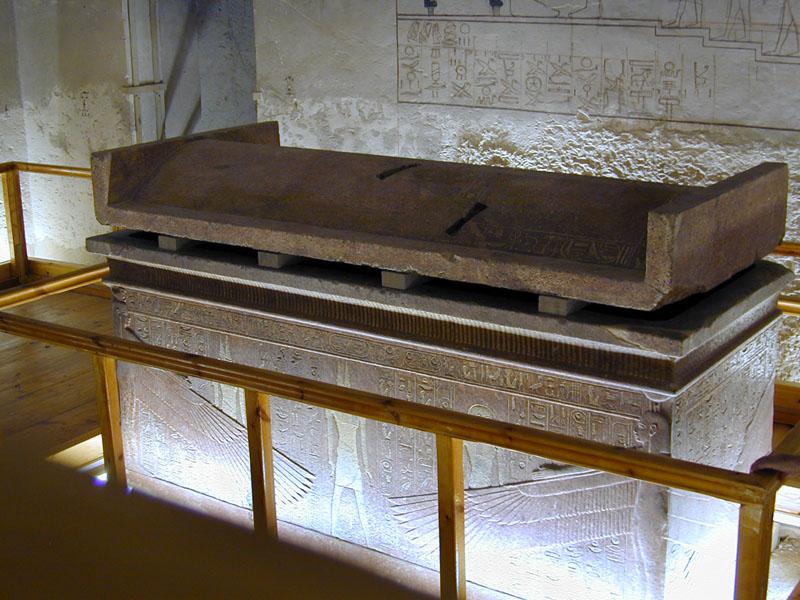 Le sarcophage royal installé dans la chambre funéraire. Le plan de la tombe marque une rupture avec les précédentes, car elle a été creusée en ligne droite jusqu'à la salle du sarcophage. Horemheb a été le dernier pharaon de la XVIIIème dynastie. Il a rétabli le culte d'Amon en s'efforçant d'effacer toutes traces du prédécesseur de Toutankhamon, son père Aménophis IV : Akhénaton.